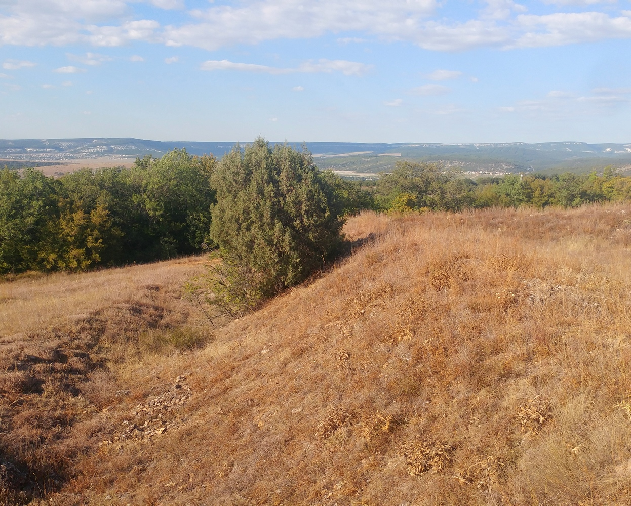 Холм Канробера под Балаклавой. Остатки английского редута на холме Канробера.